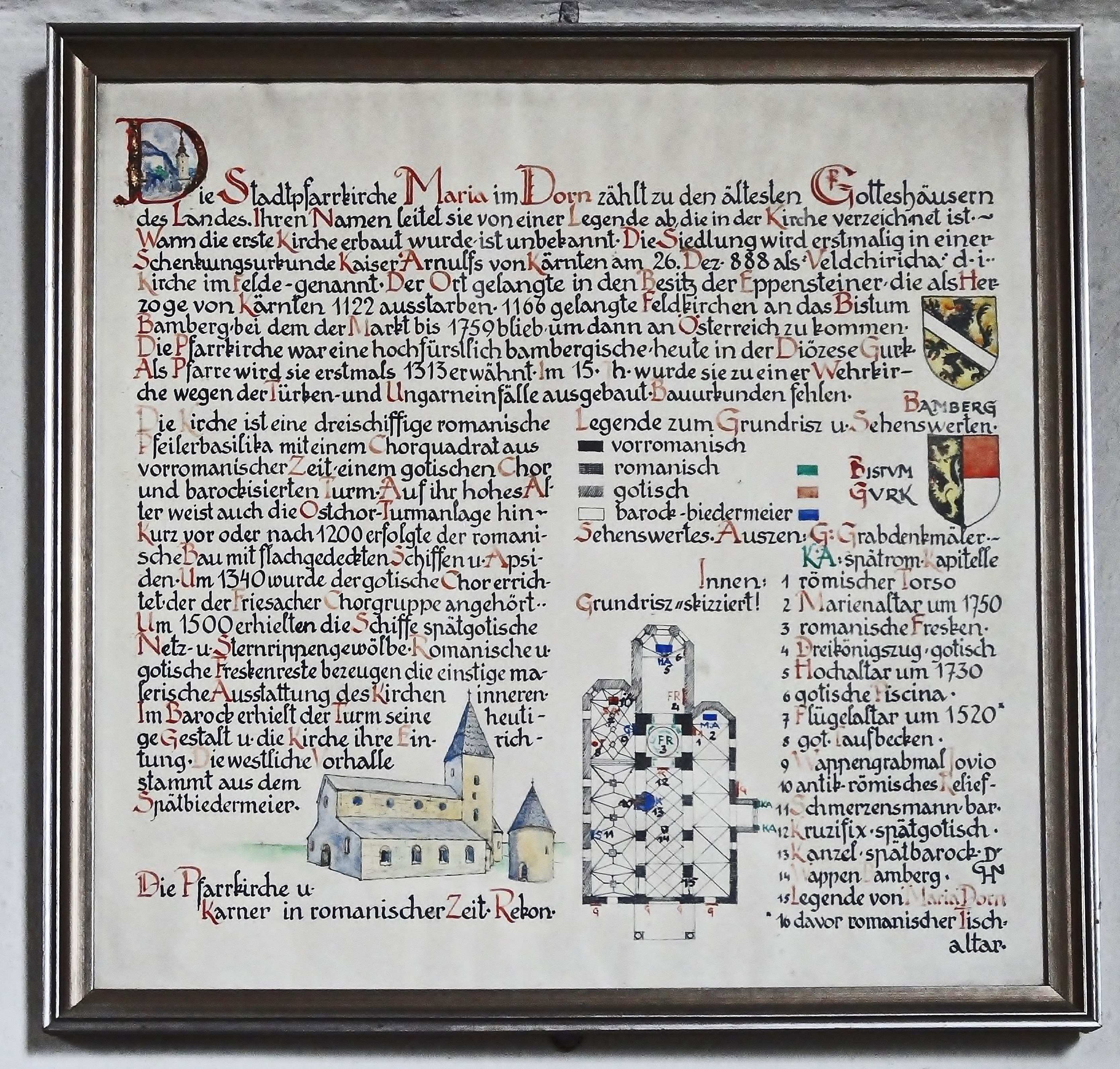 Stadtpfarrkirche Maria im Dorn (Feldkirchen in Kärnten), Geschichte mit Rekonstruktion der romanische Basilika